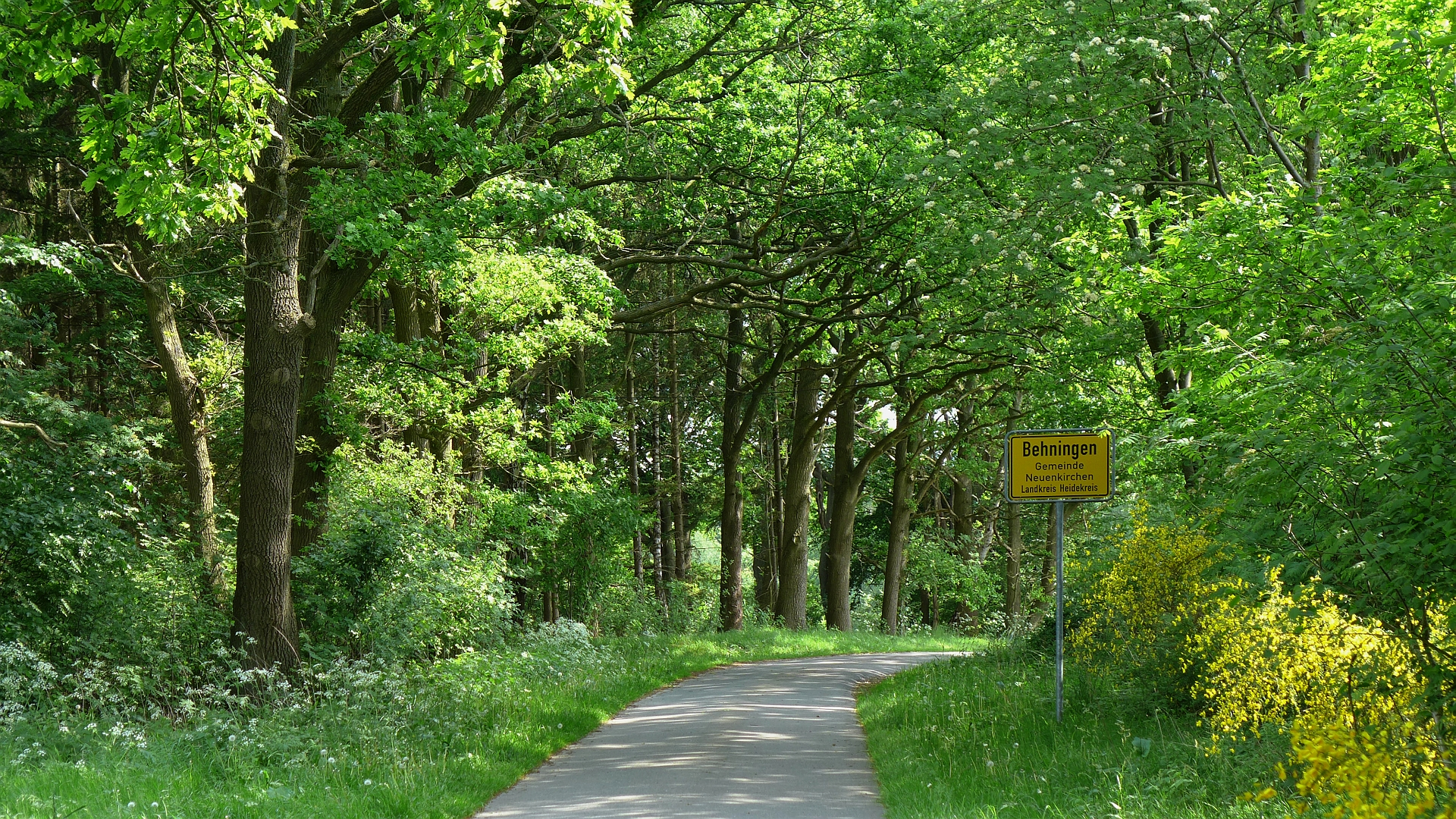 Ortseingang Behningen (Neuenkirchen), Ortstafel Vorderseite, Zeichen 310.